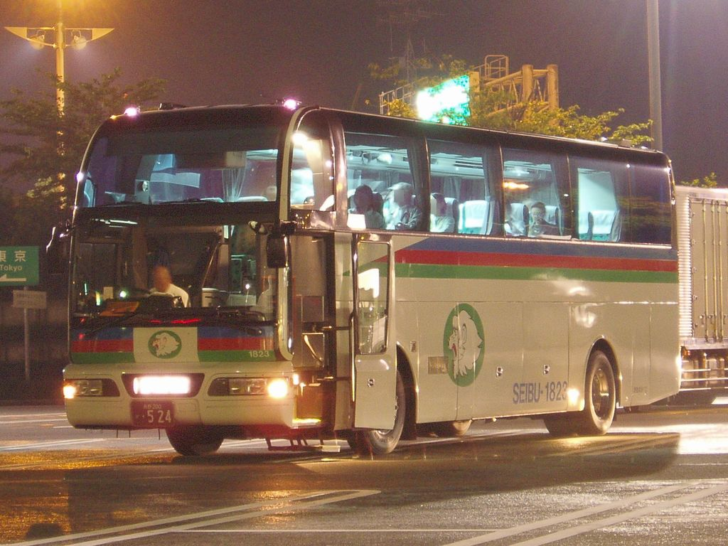 Seibu Kogen Bus 1823 Nissan Diesel KC-RA550RBN at Kamisato Service Area